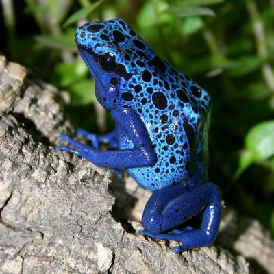 Pralesnička azúrová (Dendrobates azureus)